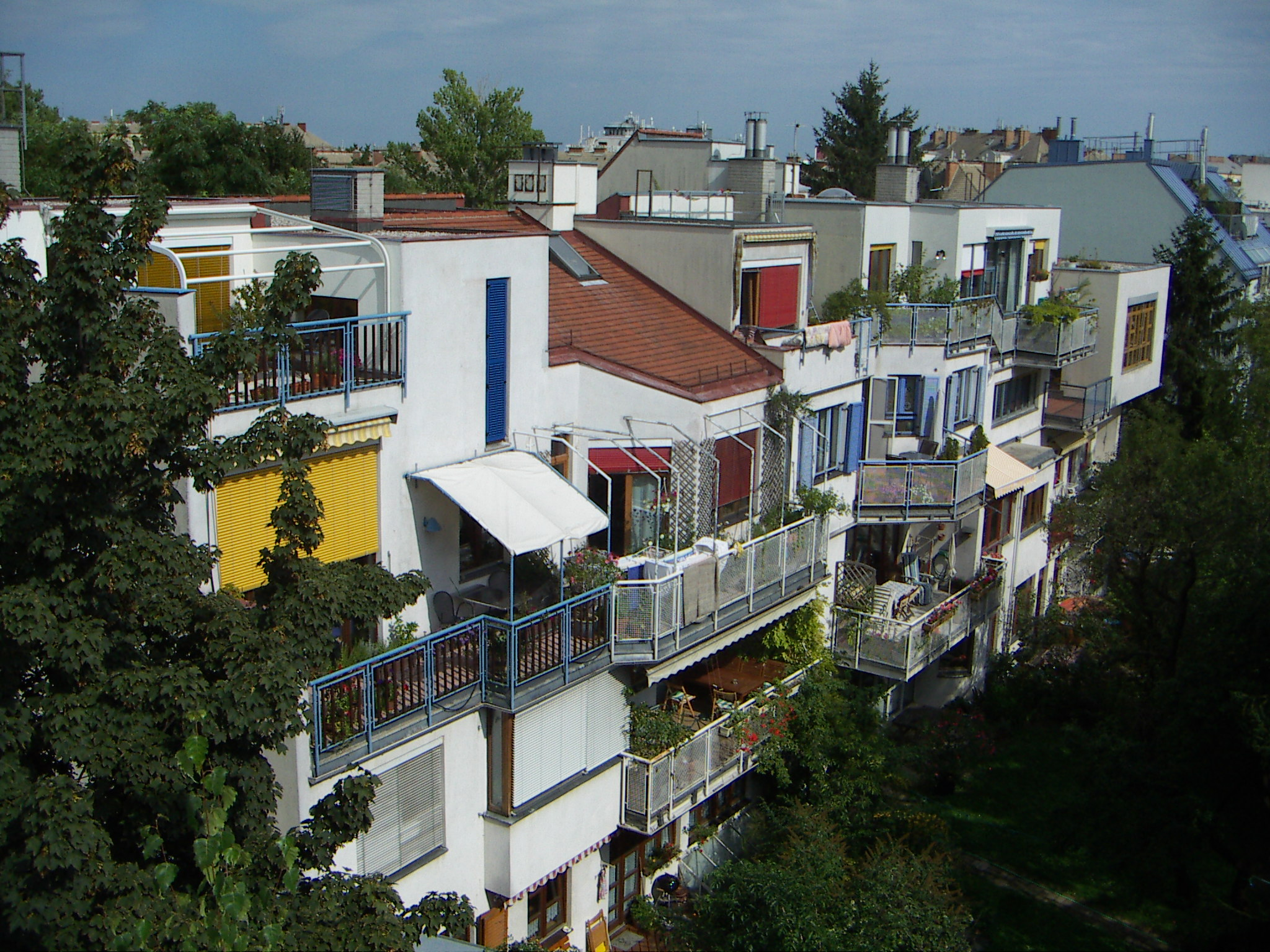 Wohnhausanlage Wohnen mit Kindern in Wien-Floridsdorf, Bezirksteil Jedlesee, Haus Wienergasse, hofseitige Fassade